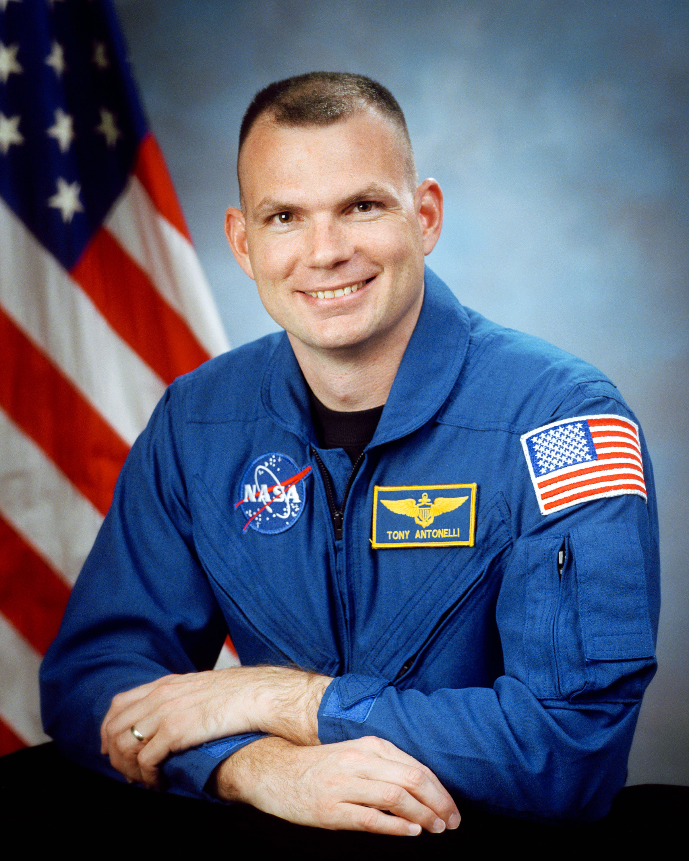 Astronaut Dominic A. (Tony) Antonelli, pilot